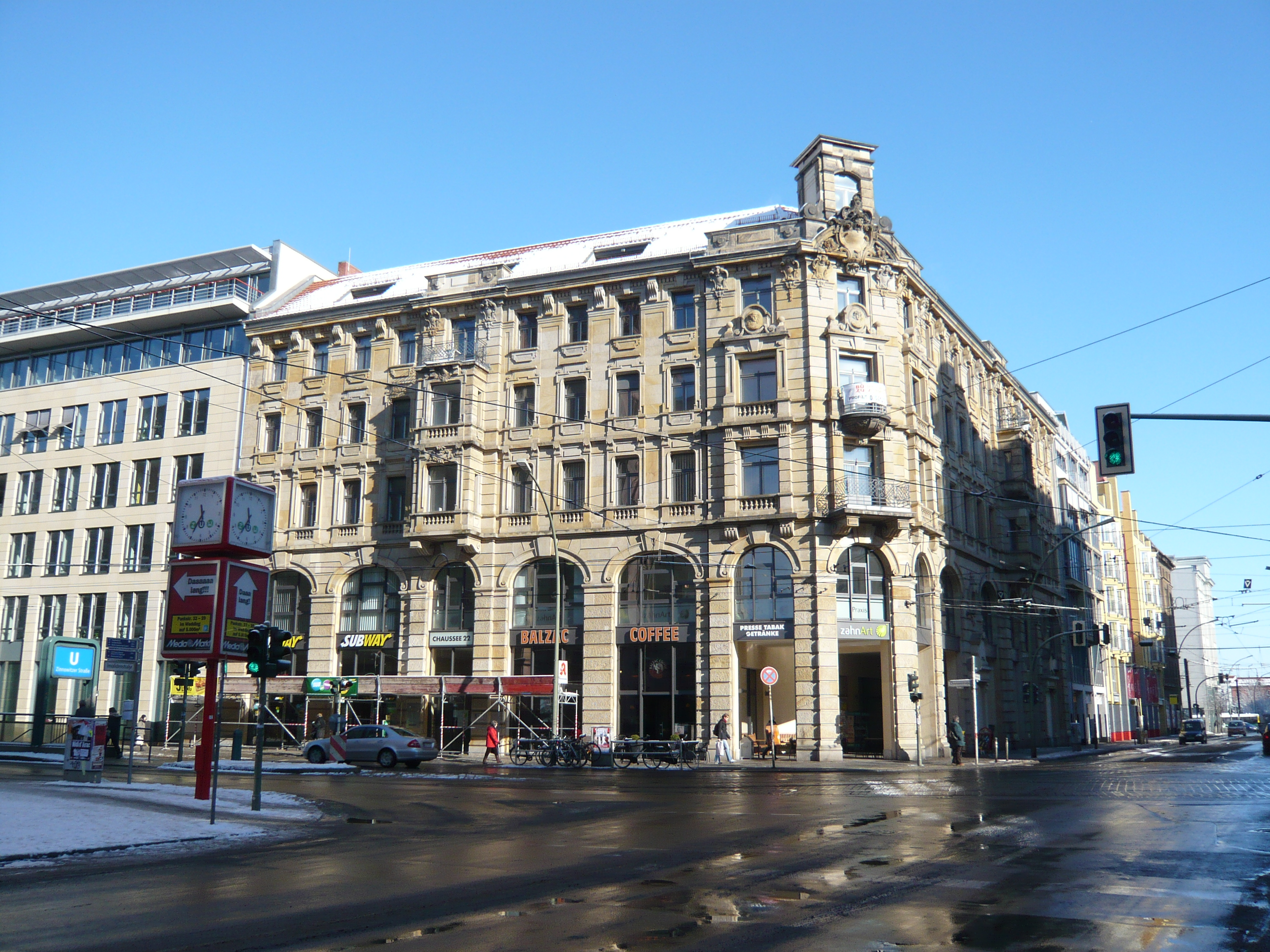 Chausseestrasse in Berlin-Mitte, Ecke Invalidenstr.